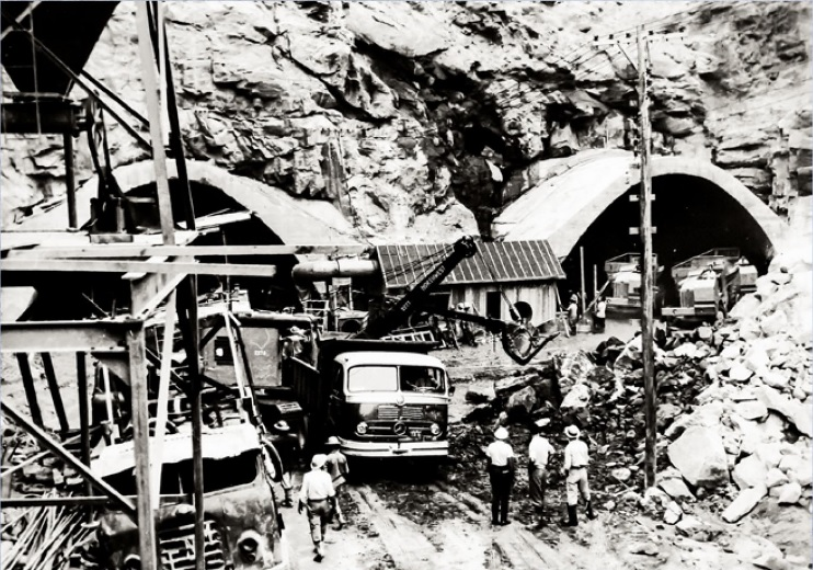 Vista da construção do emboque do Túnel Rebouças, entre 1962 e 1965.